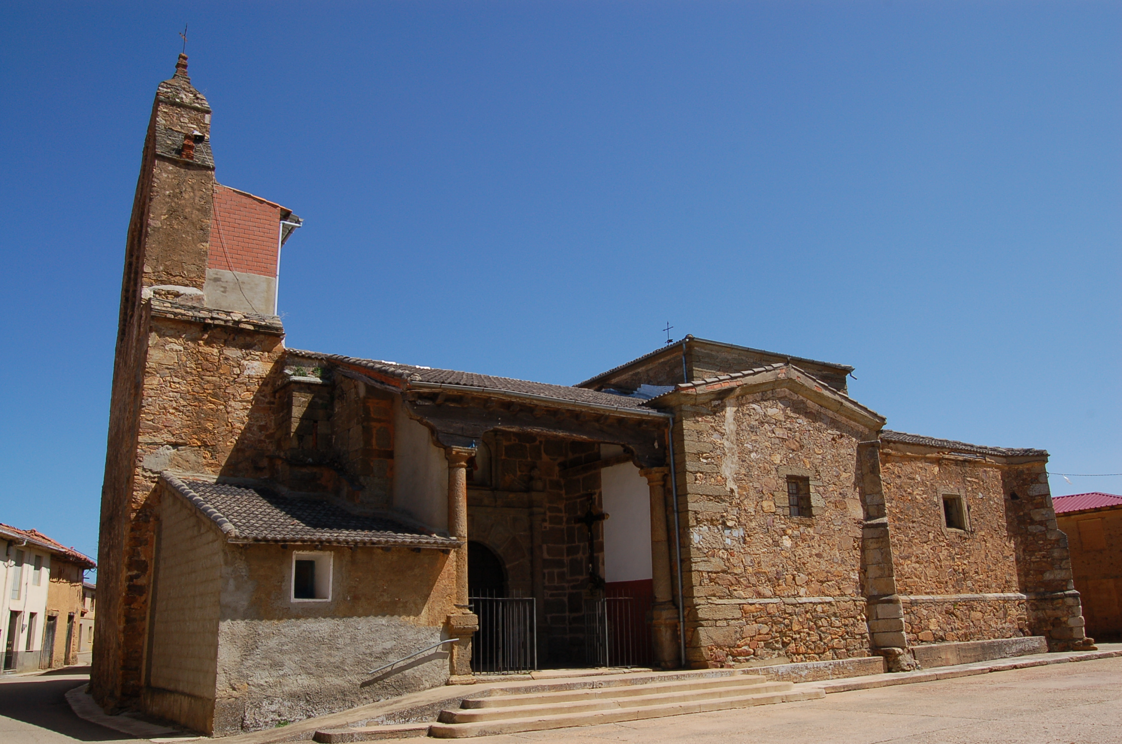 Igrexa de Uña de Quintana